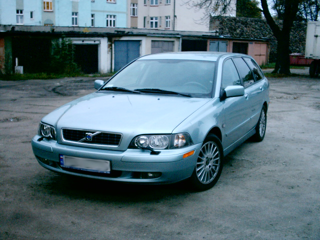 Volvo V40 Front view 24.10.05 Own work